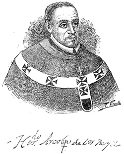 Fernando Arias de Ugarte (Bogotá, 1561 - Lima, 1638) sacerdote católico hispanoamericano. Obispo de Bogotá (1618-1623), Arzobispo de La Plata (Charcas) (1623-1628) y V Arzobispo de Lima (1630 a 1638).